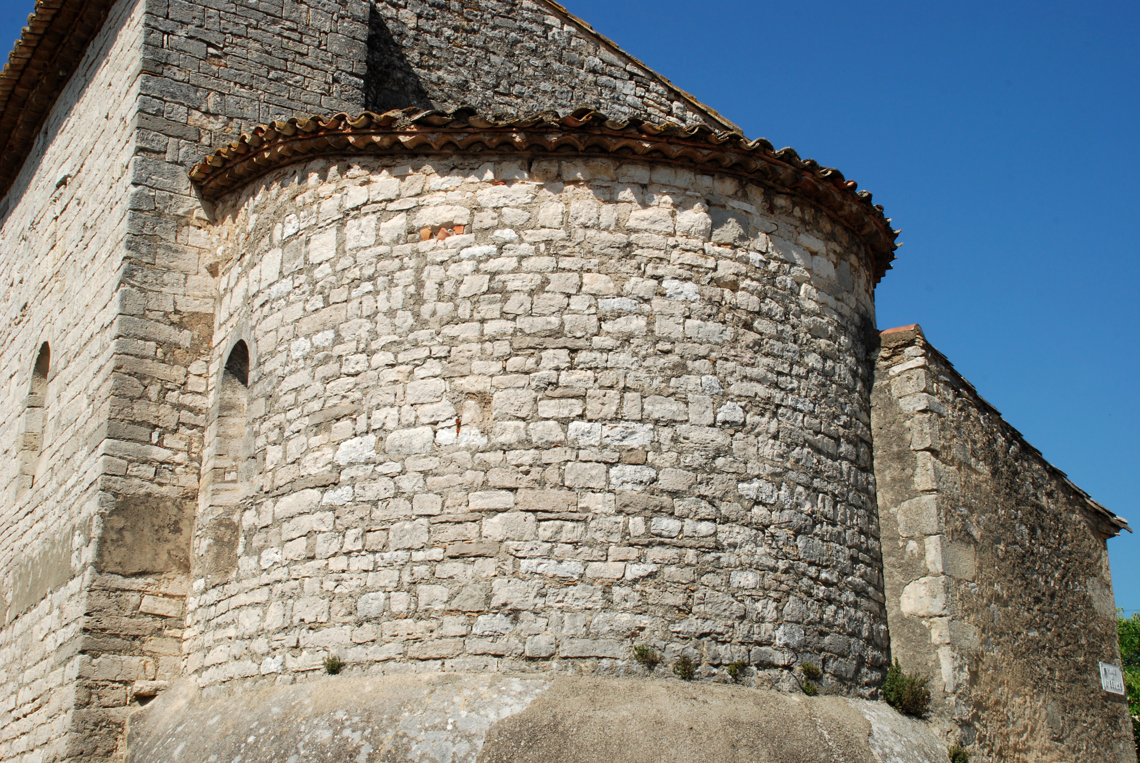 France - Hérault - Église Saint-Nazaire-et-Saint-Celse de Buzignargues